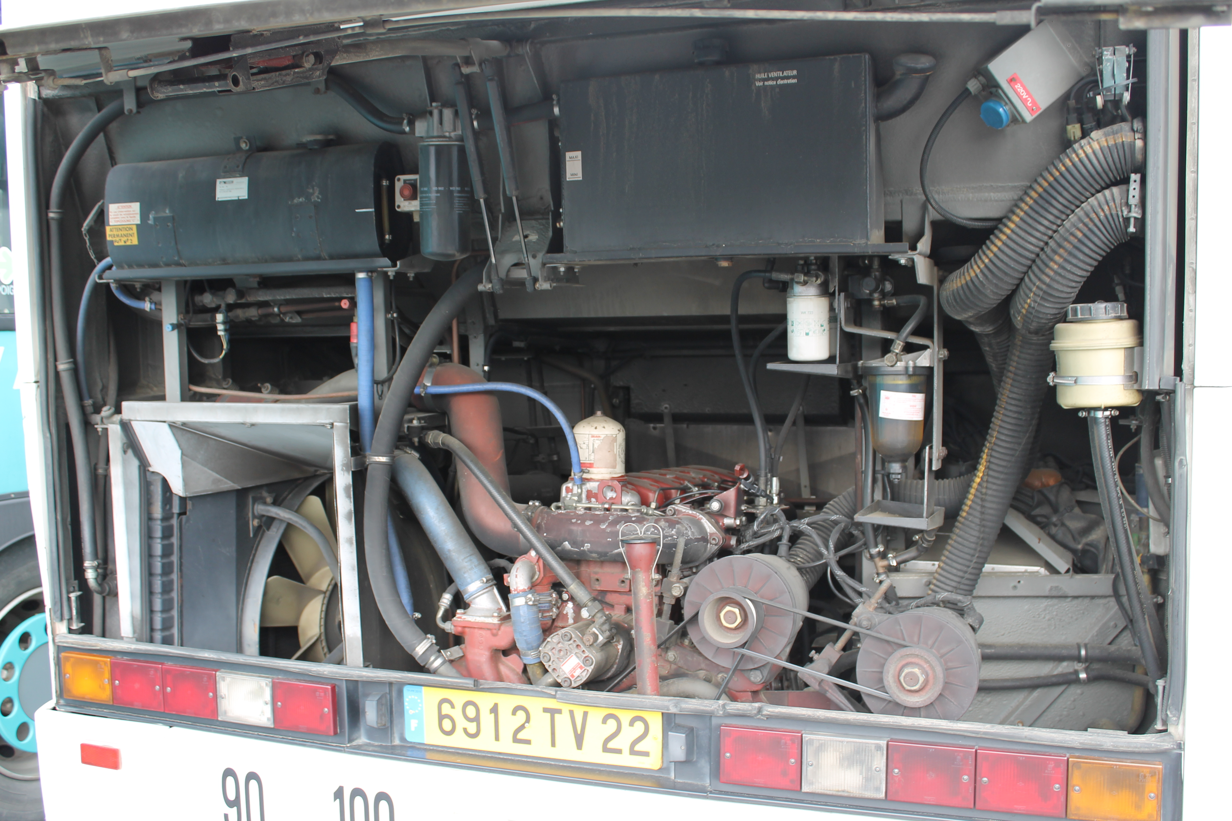 Renault FR1 - moteur